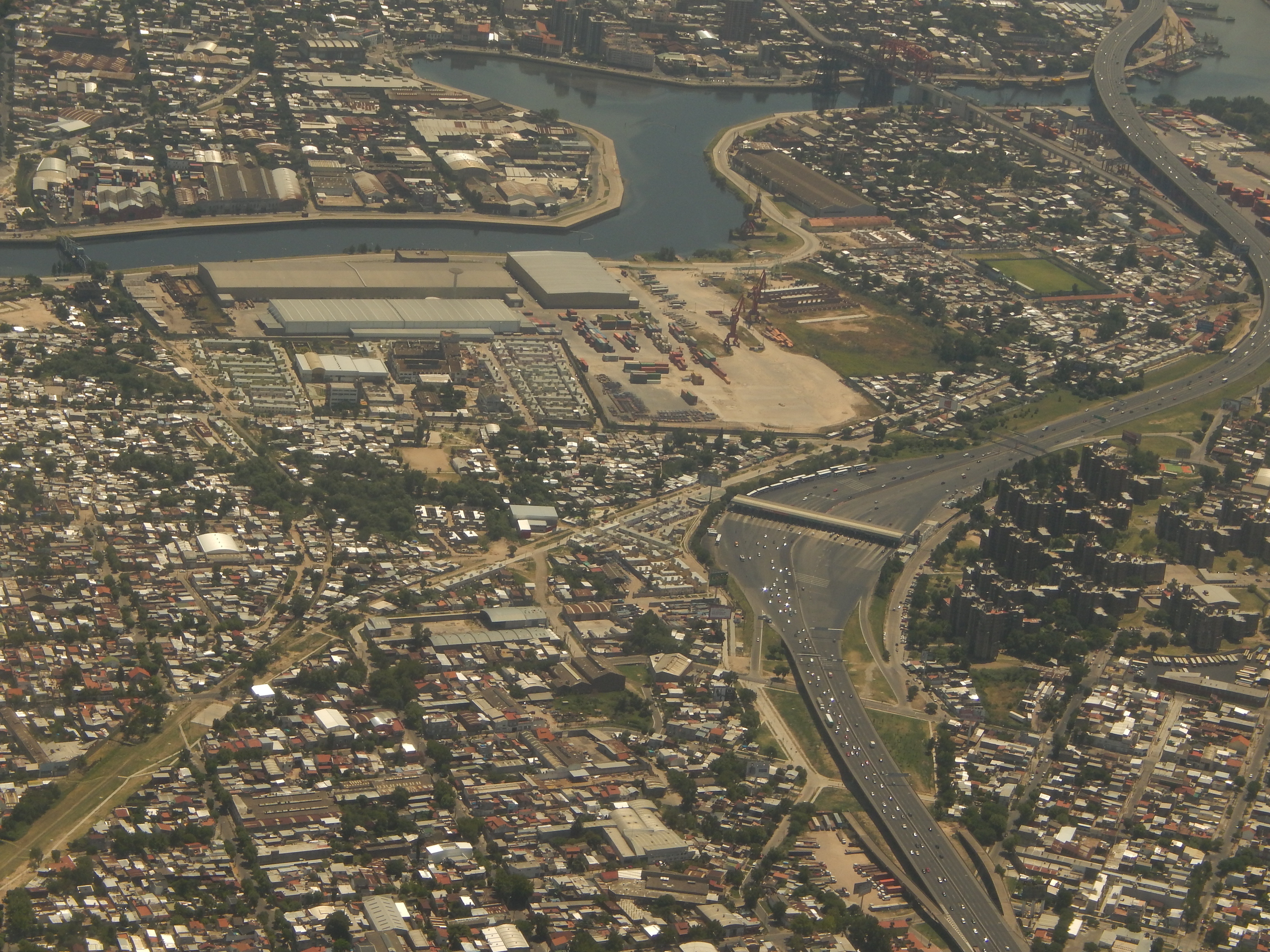 Partido de Avellaneda, Provincia de Buenos Aires, Argentina